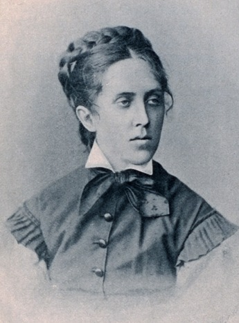 Marija Nikolaevna Osanina (Olovennikova) (1853-1898)